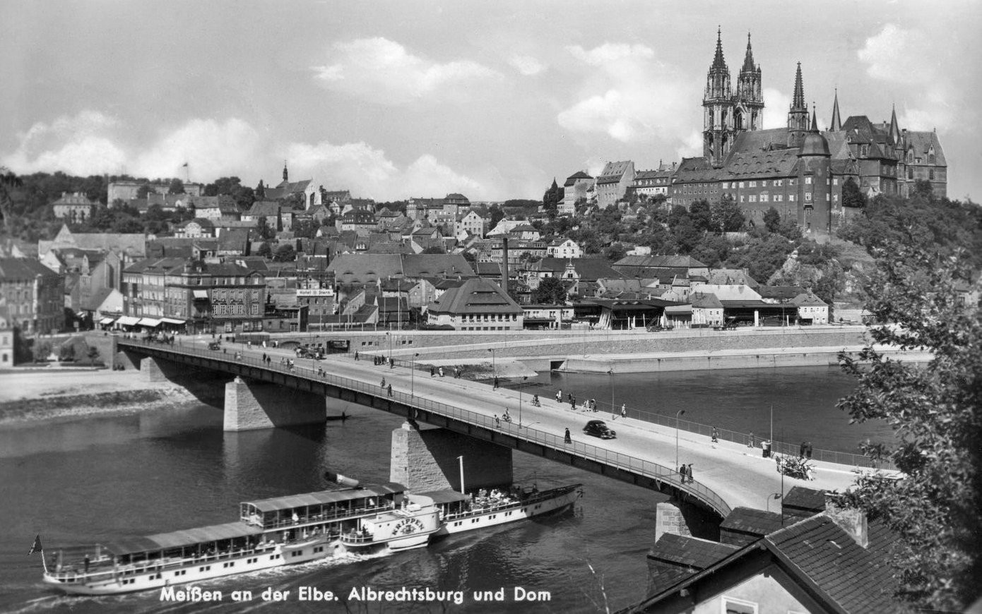 Meißen; Albrechtsburg und Dom - Elbe mit Dampfer Krippen This postcard is from publisher Brück & Sohn in Meißen ( postcard has a unique number 27594 and is available in a higher resolution at the publisher. This images was uploaded in a cooperation project between Wikipedians and the publisher.